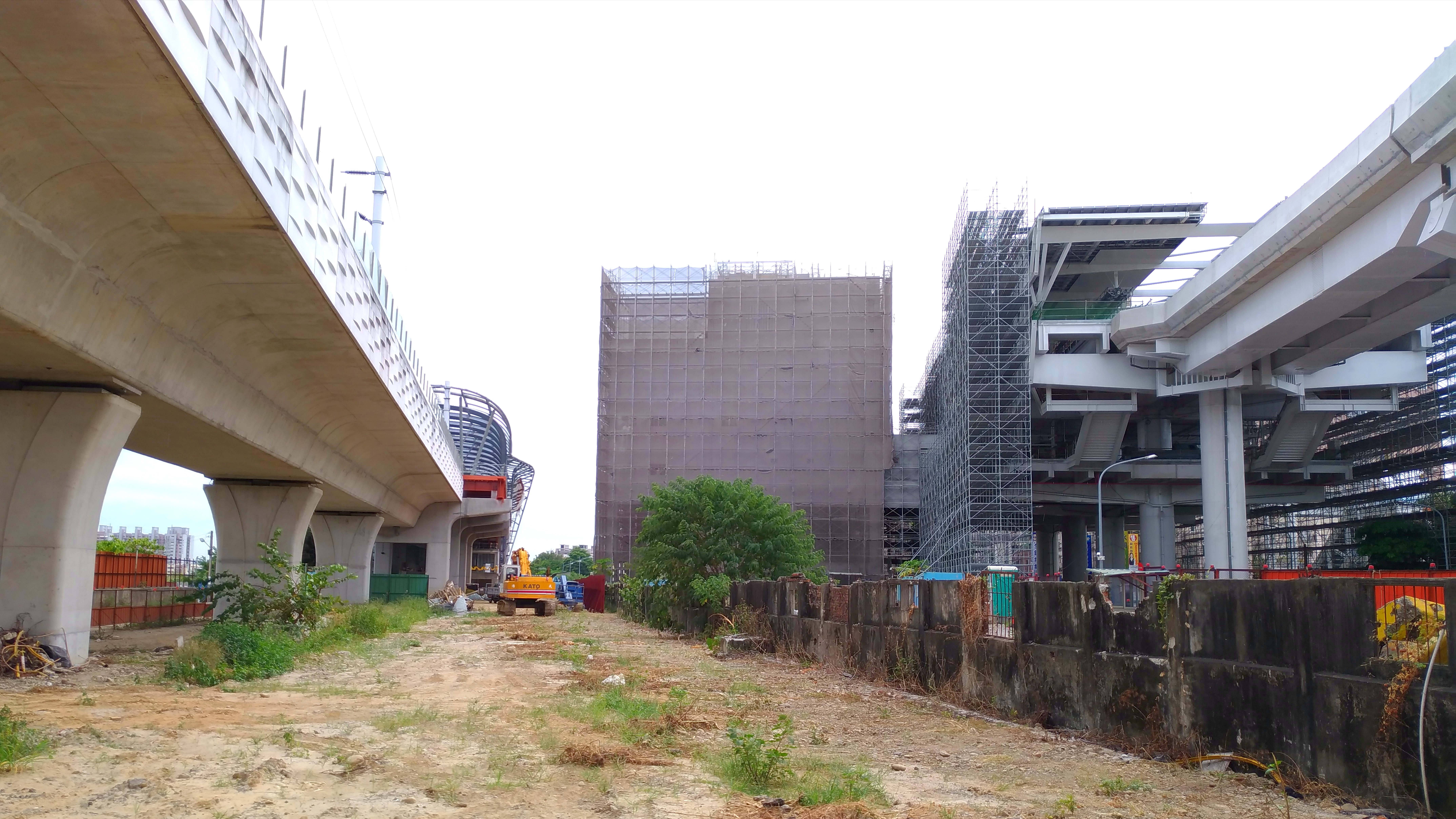 中文（台灣）: 台鐵松竹車站與台中捷運G4站2017年10月工程